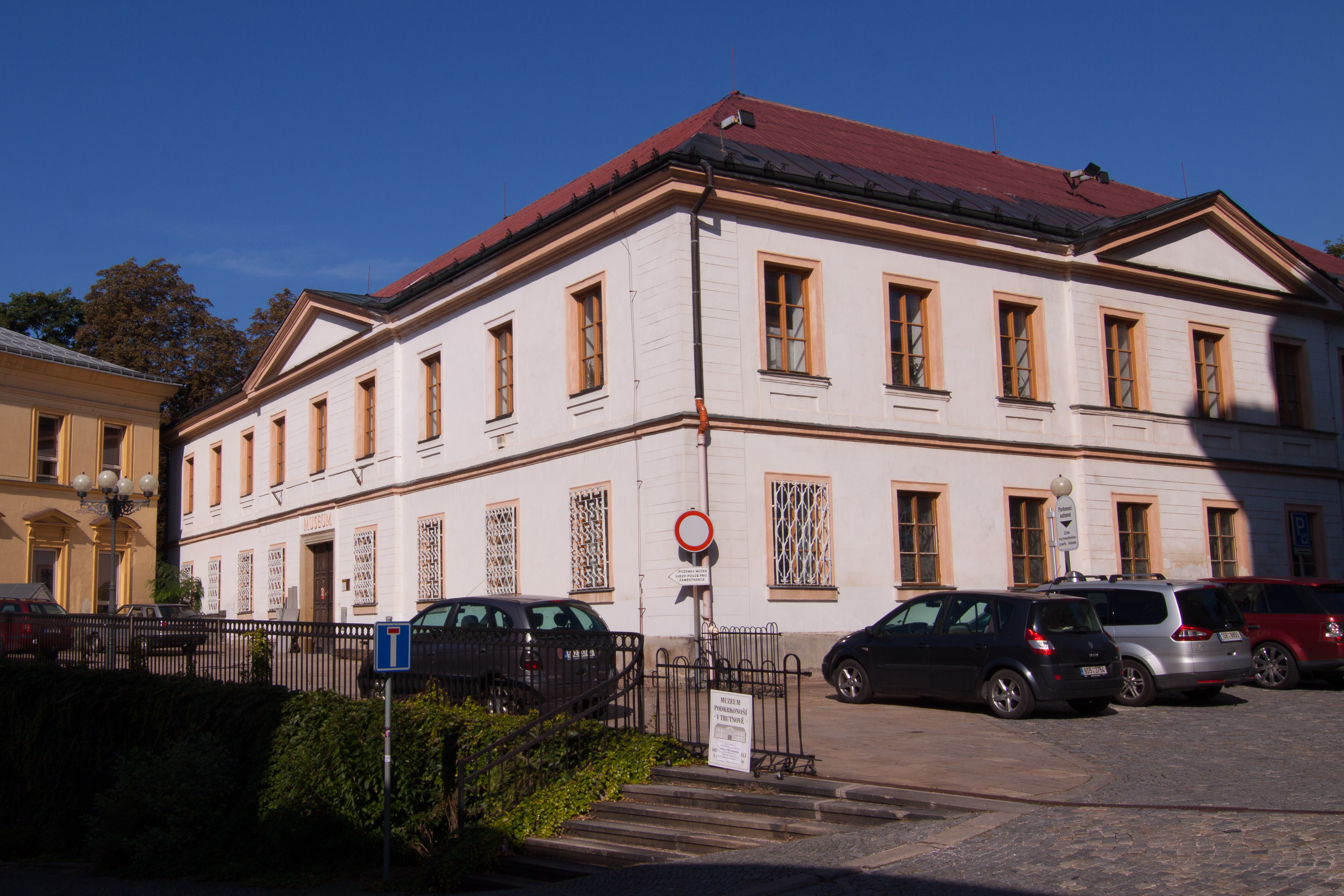 Muzeum Podkrkonoší, Školní 150, Trutnov-Vnitřní Město.